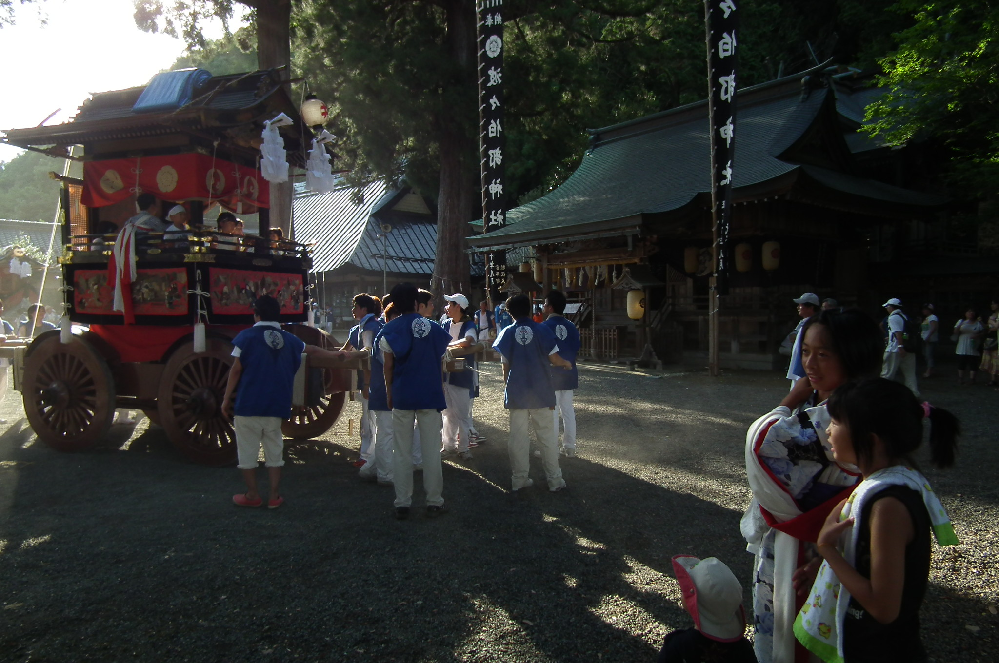 Hohokabe-jinja Festival 波々伯部神社 8月第1土・日曜日（ 旧暦6月14日）例祭「おやま行事」